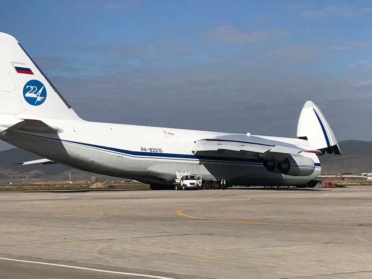 An-124 during unloading. Airport in Ulan-Ude, Buryatia, Russia